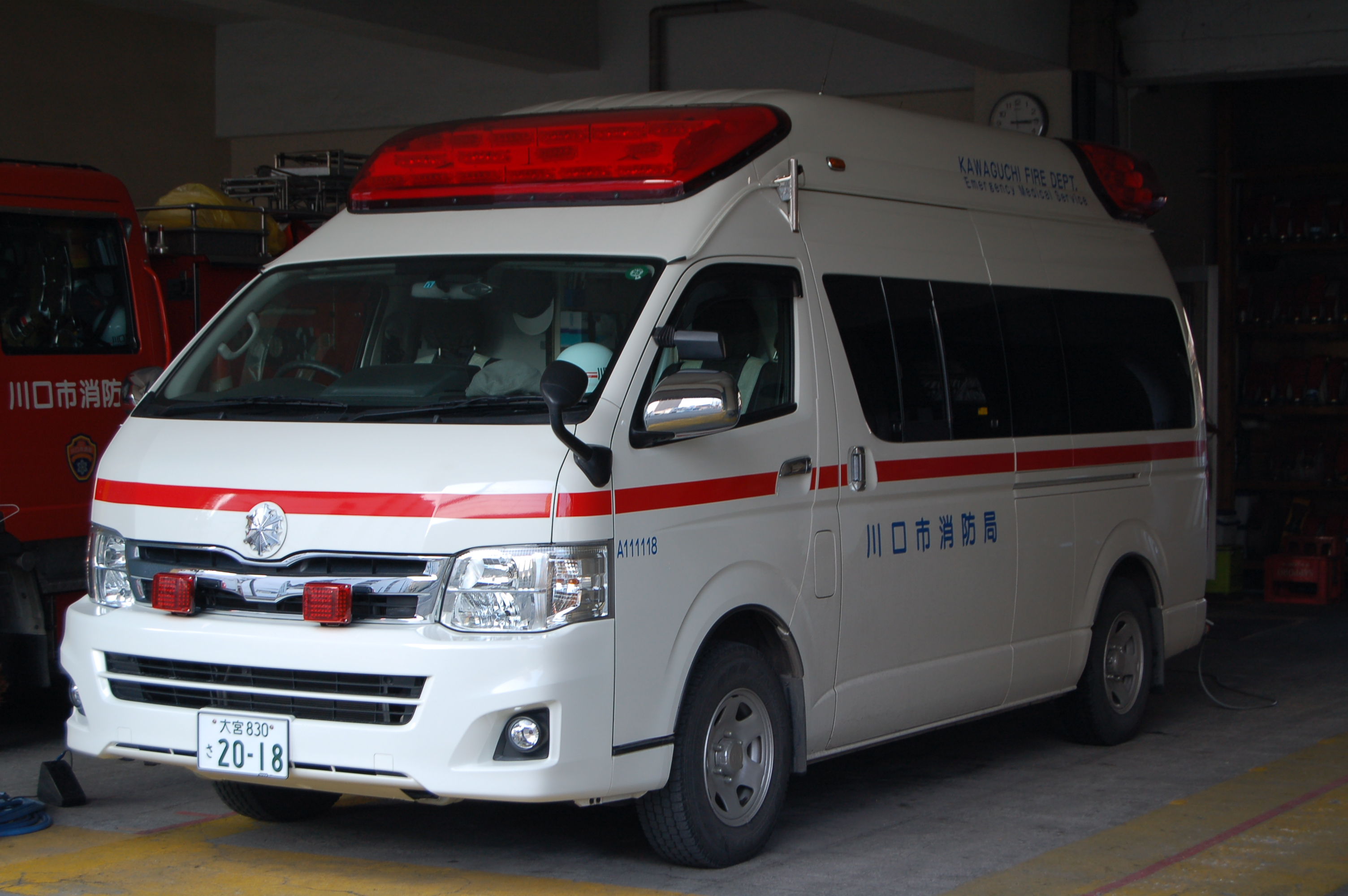 川口市消防局南消防署中央分署所属の救急中央1